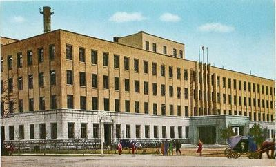 Hsinking branch of SMR（满铁新京支社）